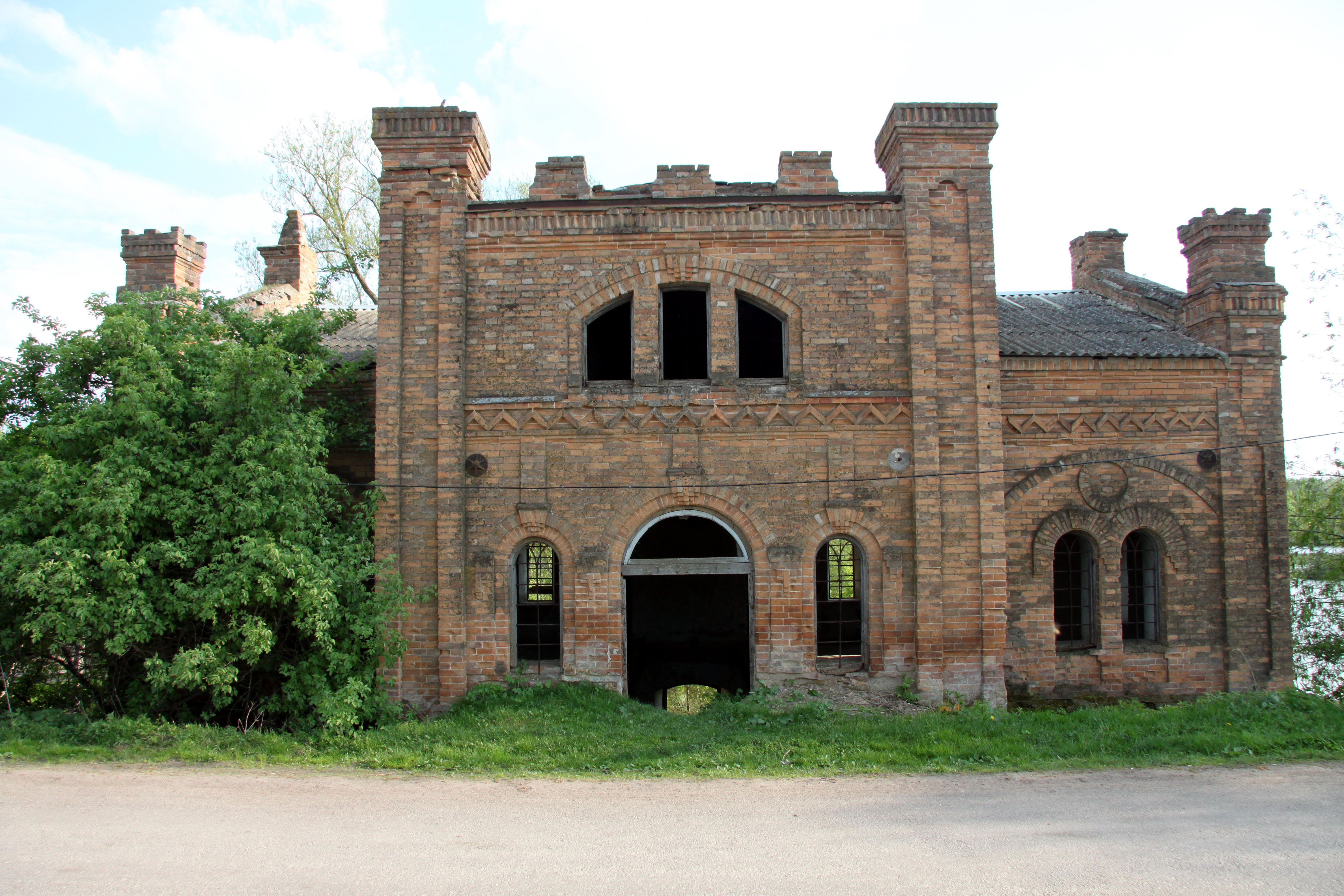 Млин, вул. Садова, Новофастів